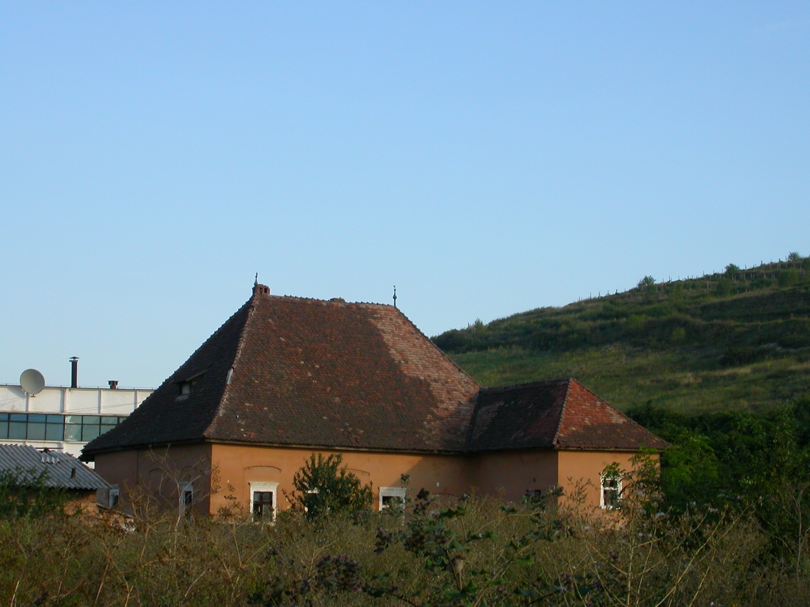 Castelul Eszterhazy, sec. XVII